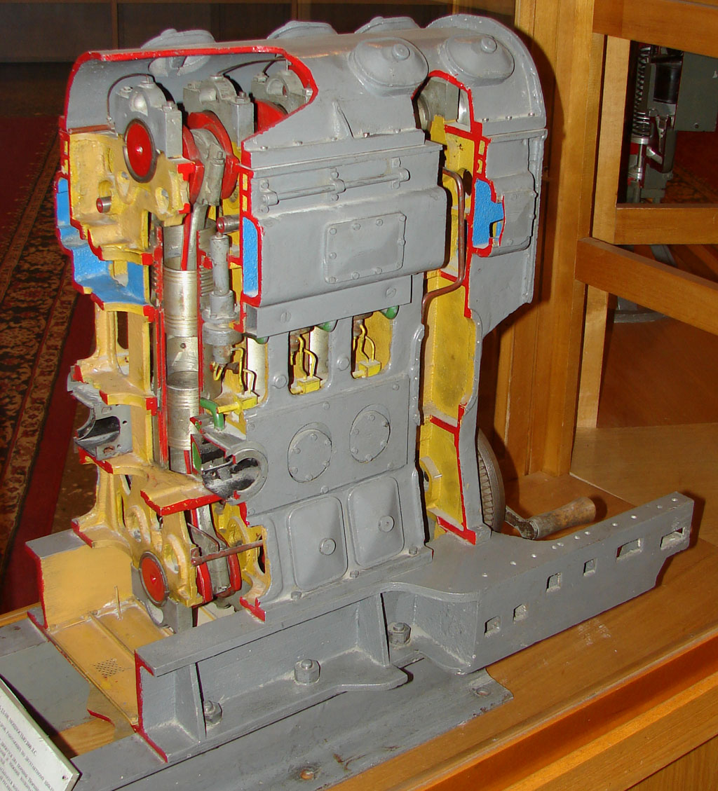 Diesel 2D100